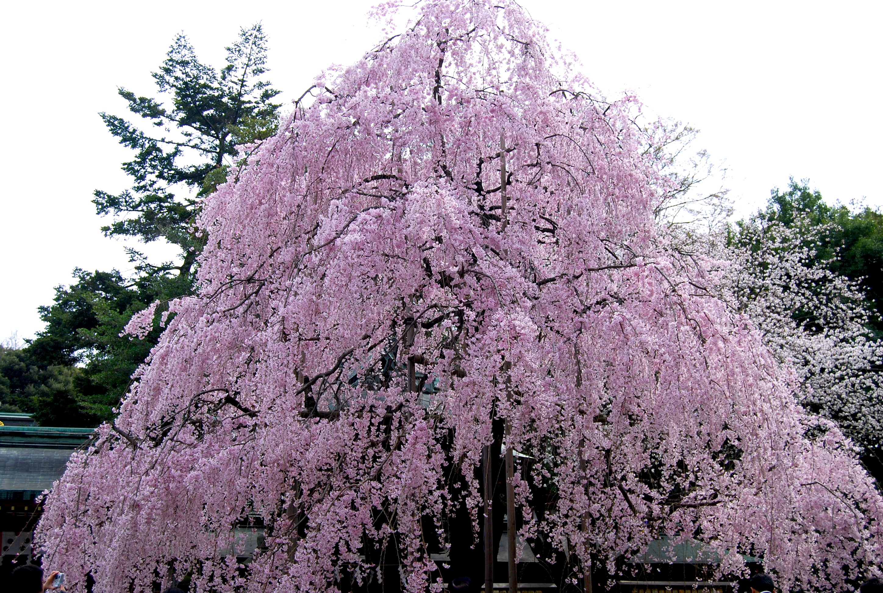 東京都府中市の大国魂神社にて。